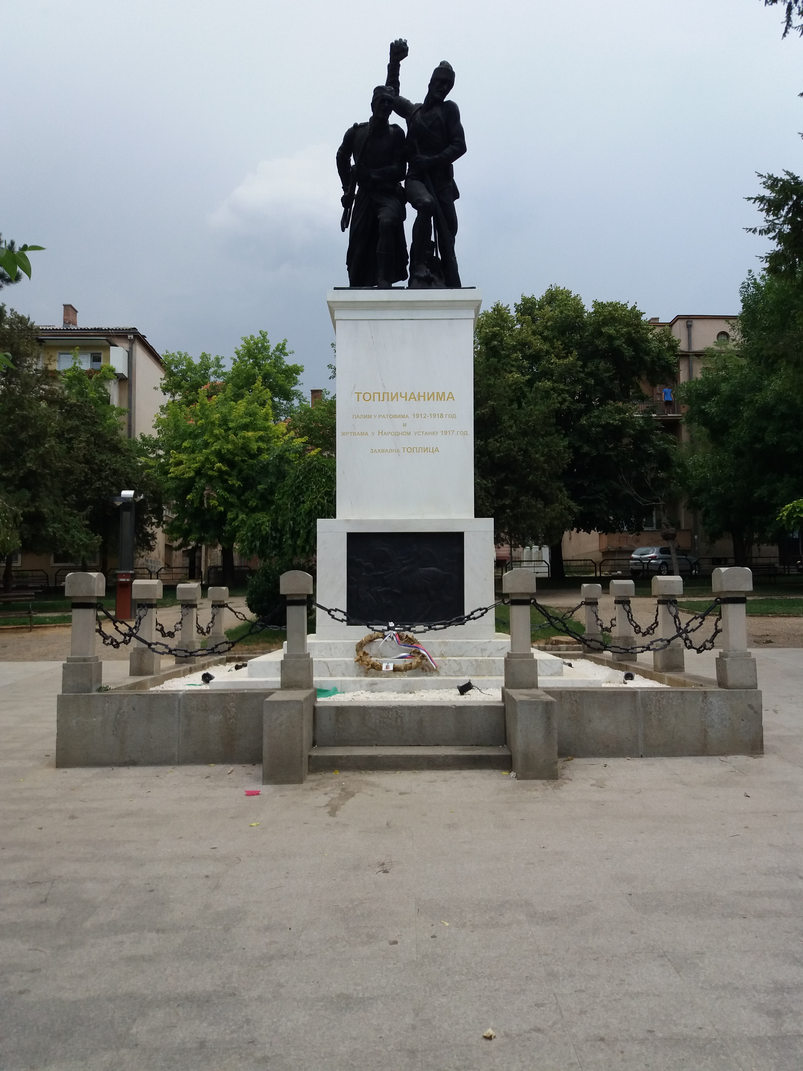 Srpski (latinica): Prokuplje